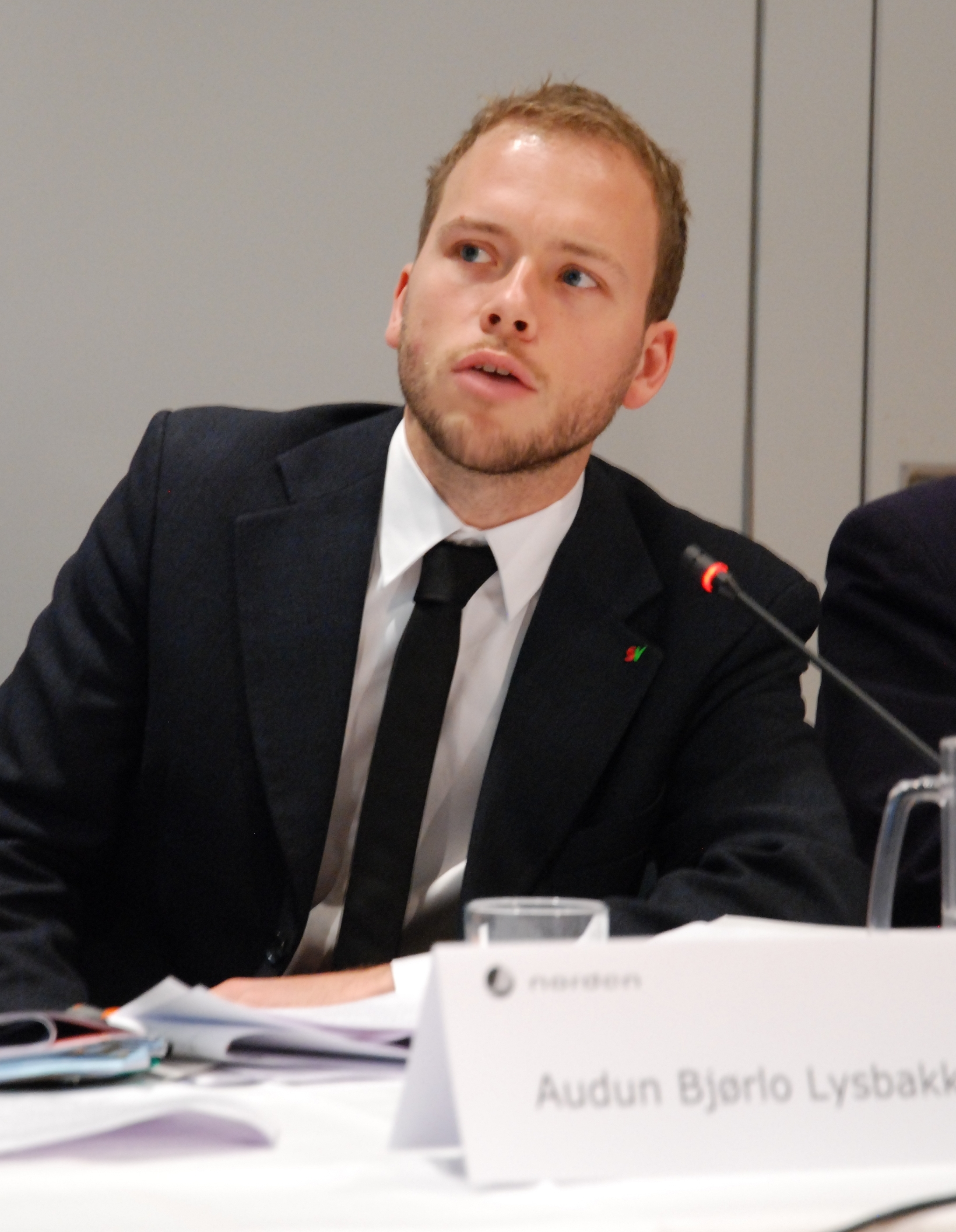 Barne-, likestillings- og integreringsminister, Norge